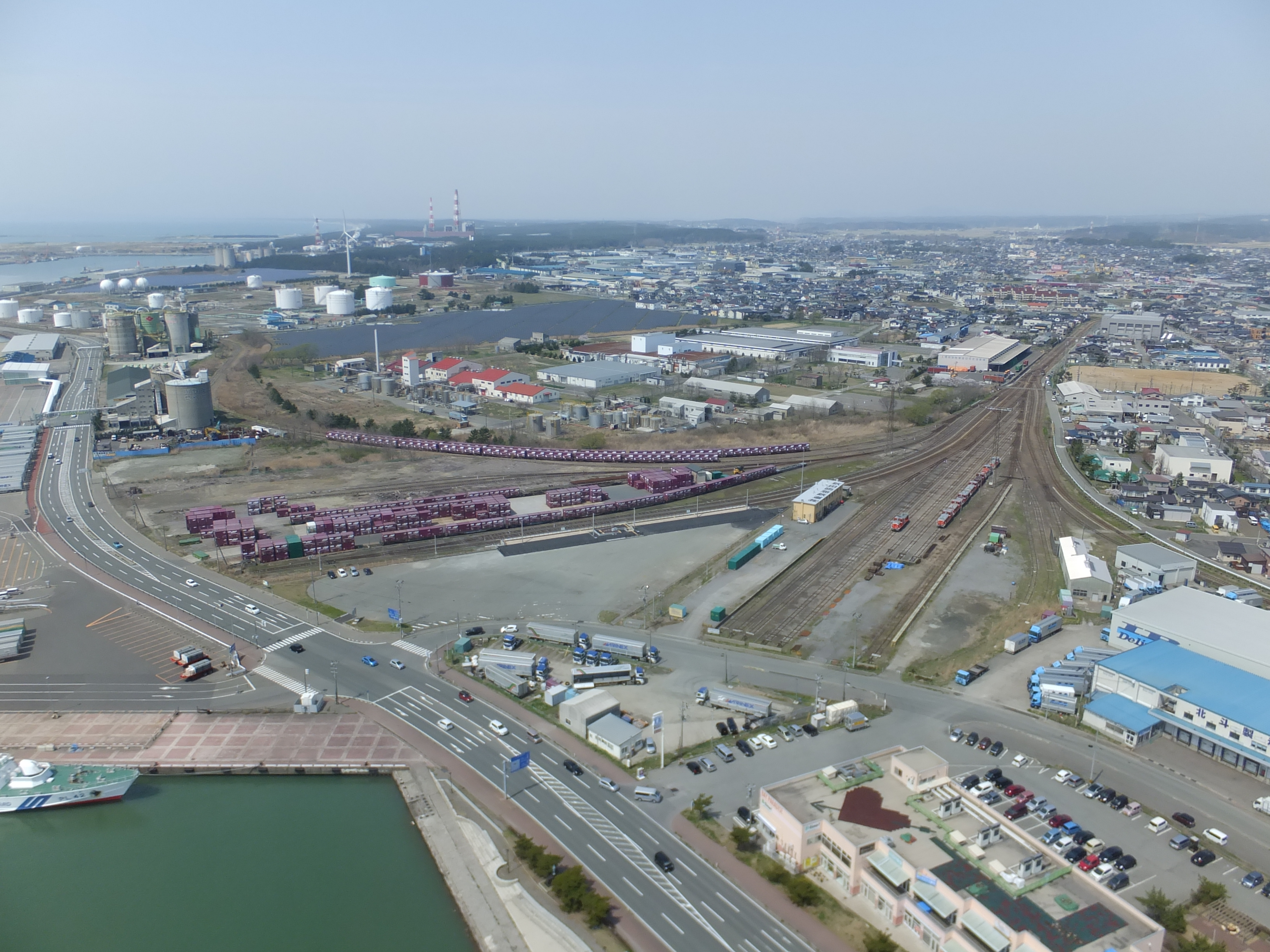 秋田ポートタワー・セリオンより